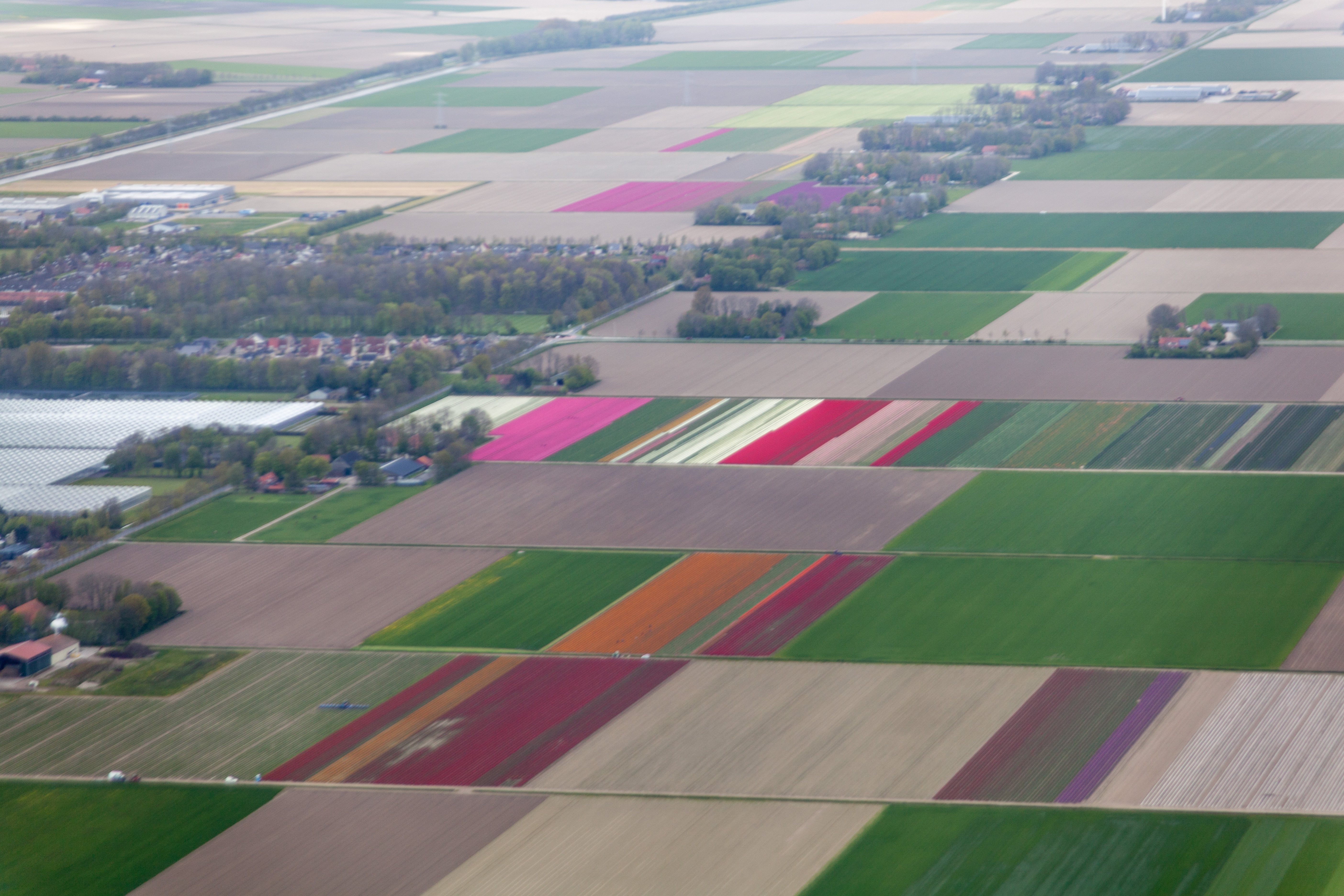 8307 Ens, Netherlands